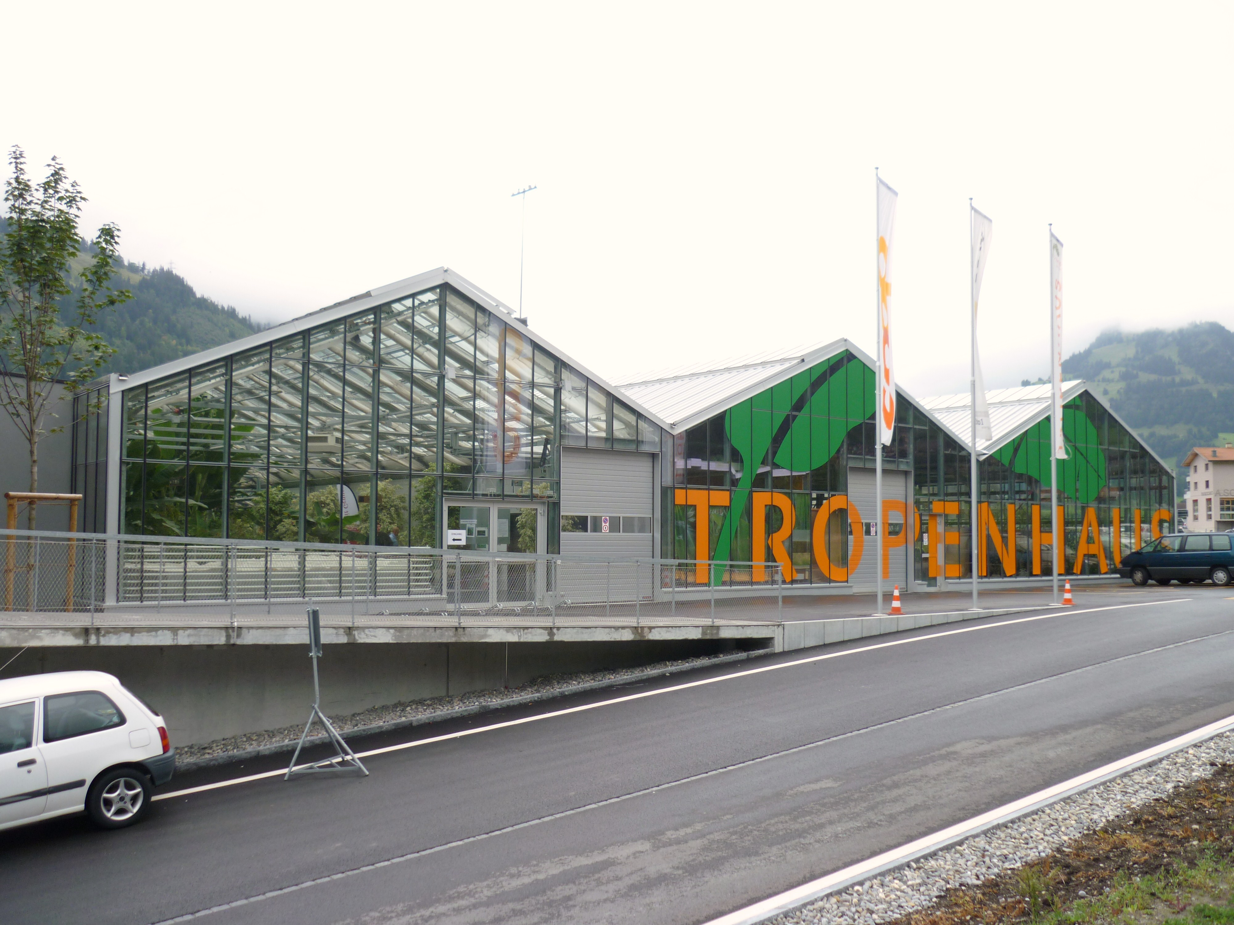 Das Gewächshaus des Tropenhauses Frutigen